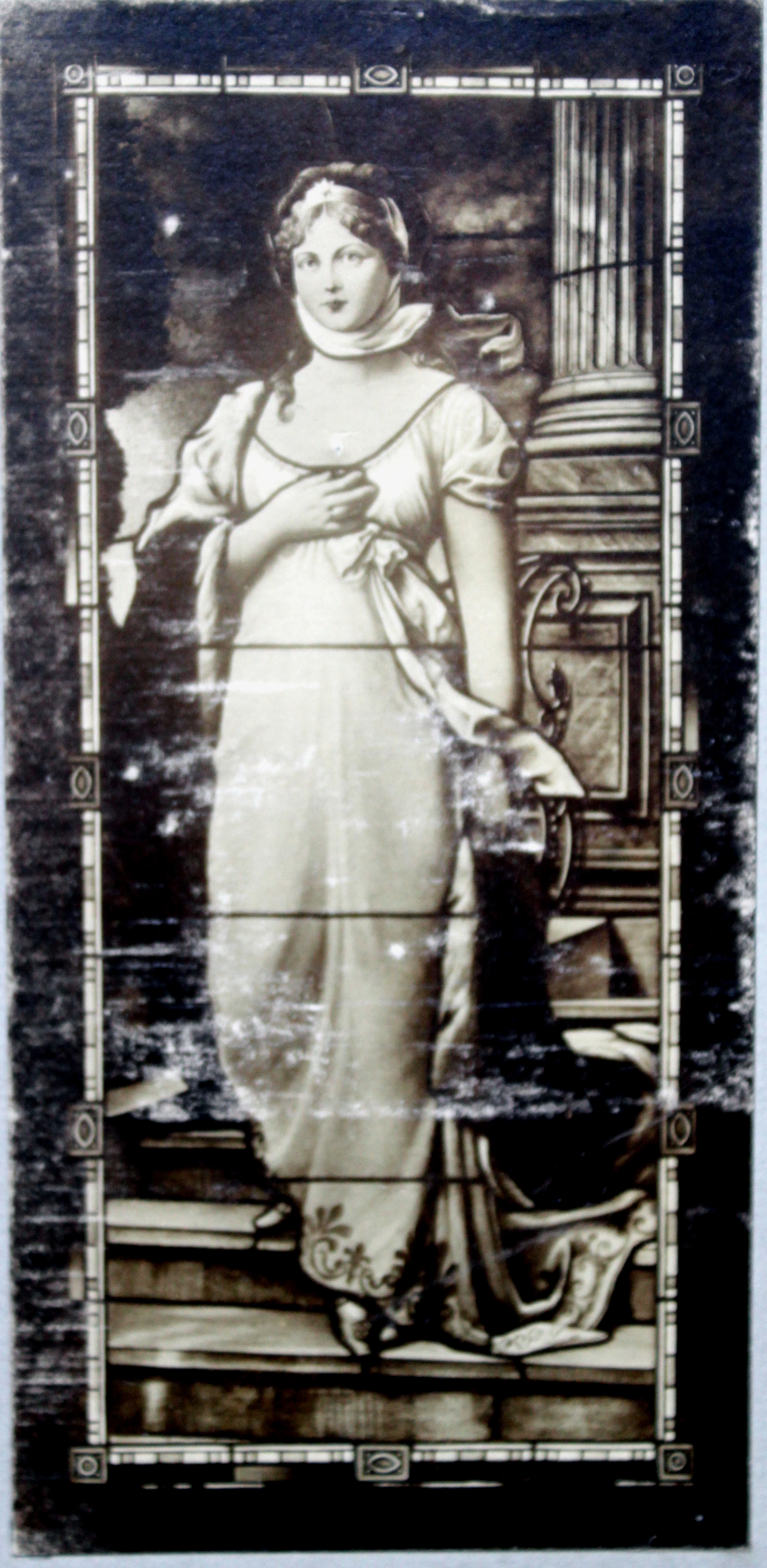 Bildnis Königin Luise